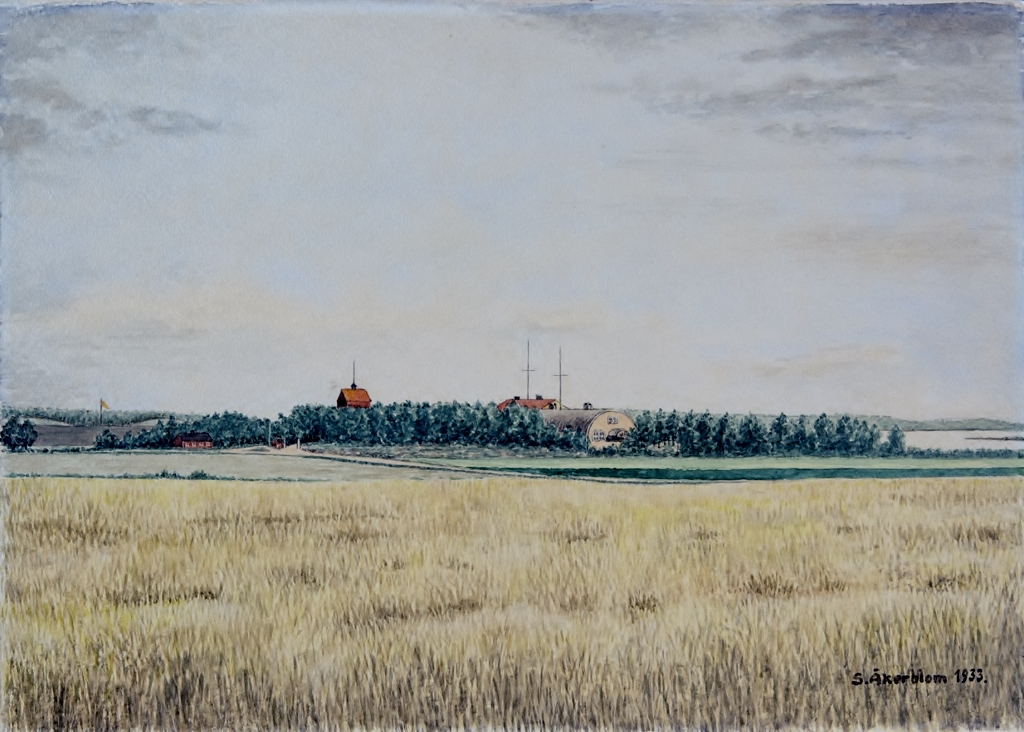 Akvarellmålning föreställande Roslagens flygkår (F 2) i Hägernäs. Målningen är signerad S. Åkerblom, och som även hade en café-rörelse i en villa nära skolan, där motorvägen nu går fram.